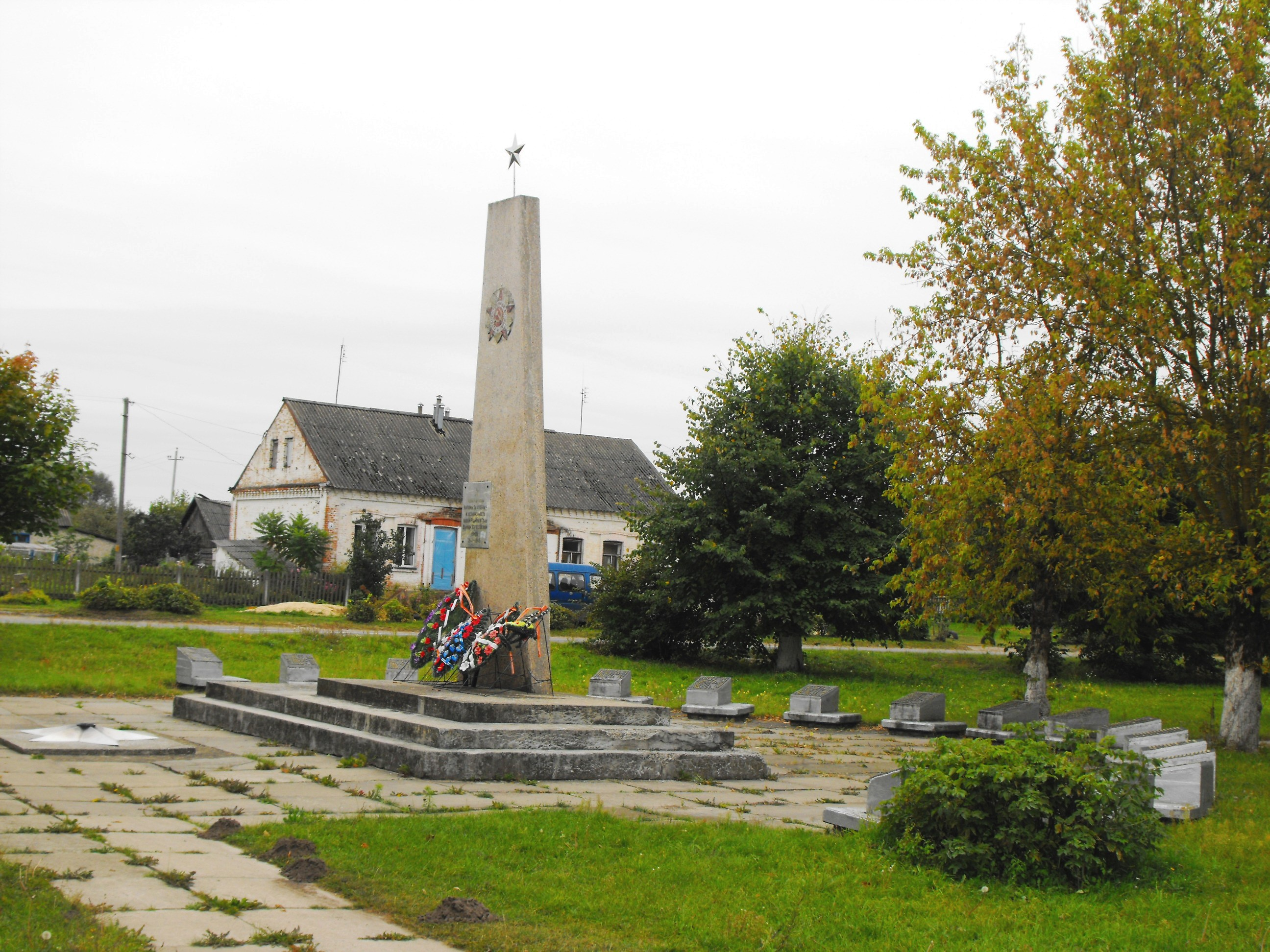 Памятник жителям деревни Малеч (Малец) Березовского района Брестской области (в том числе и евреям), убитым нацистами во время оккупации в 1941-1943 годах.